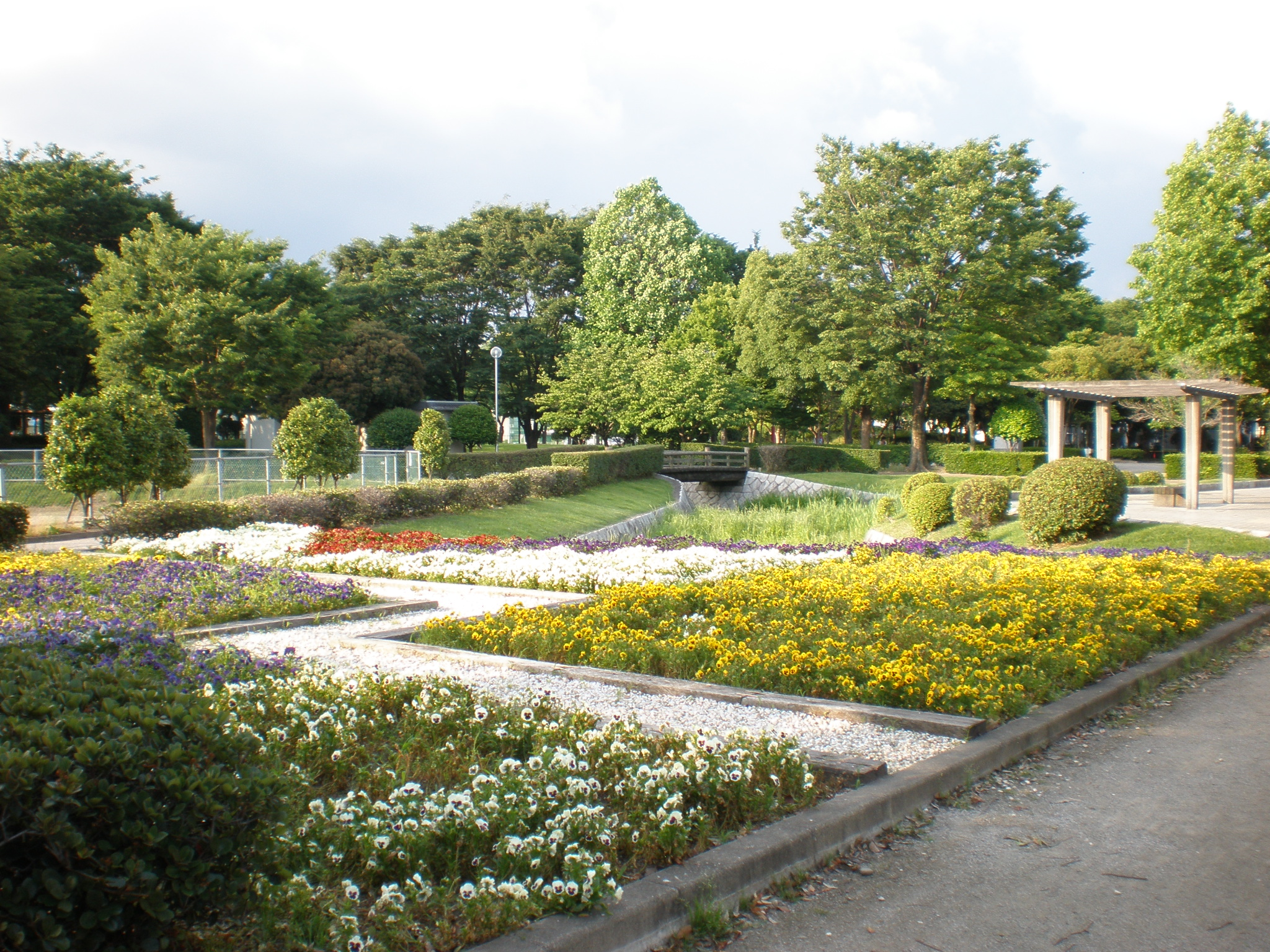 愛知県小牧市にある市之久田中央公園